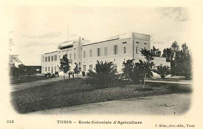 L'Ecole Coloniale d'Agriculture de Tunis, Tunisie